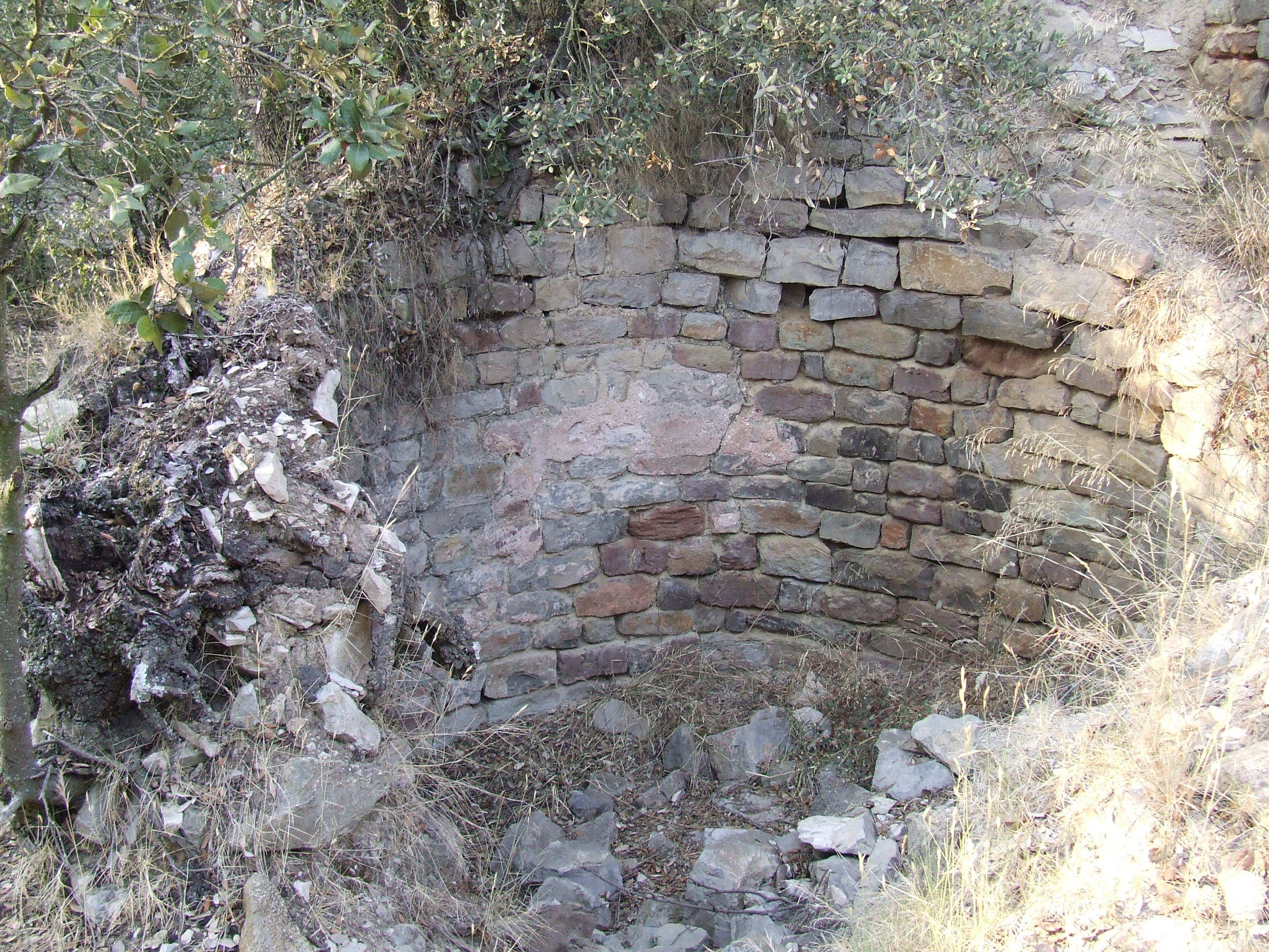 Castell de Clarà (Moià, Moianès)